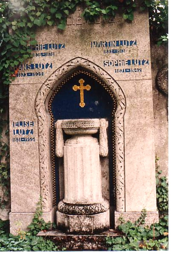 Grabstätte Martin Lutz (Unternehmer)